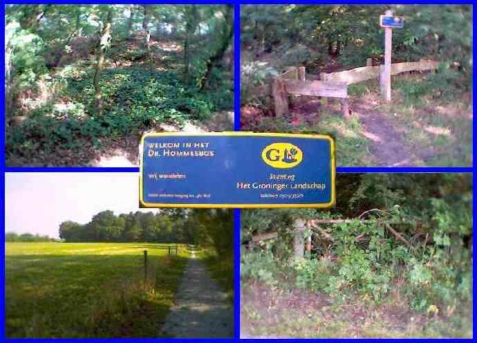 Hommesbos.